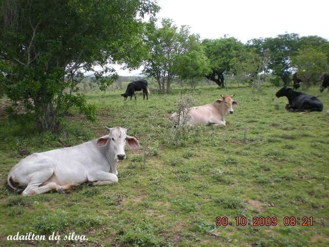 Origem do Nome muitas vacas Pintadas.